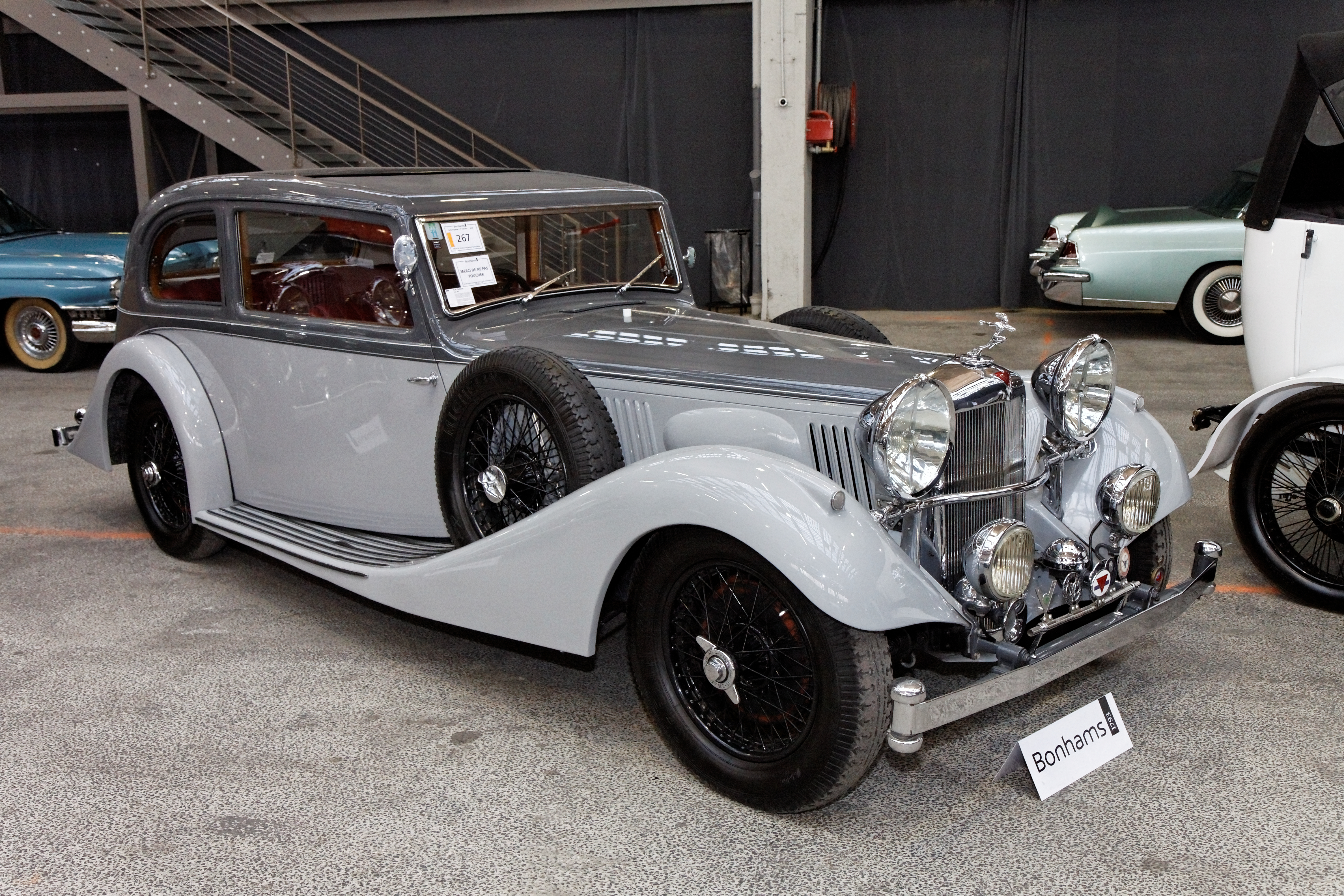 Alvis 4.3-Litre 'Long Bonnet' Sports Saloon